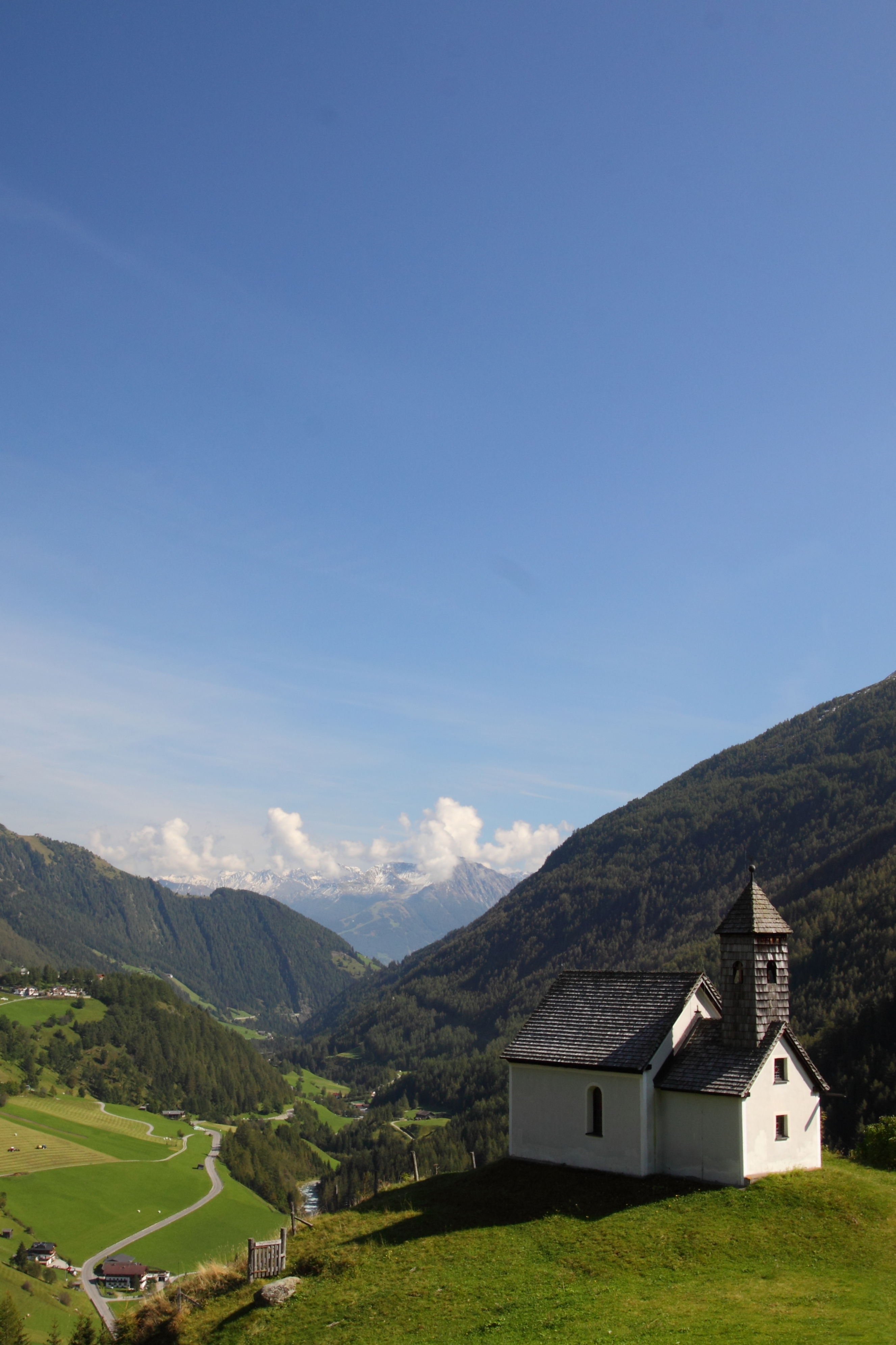 Kapelle Maria von Gutenrat - "Eggerkapelle"